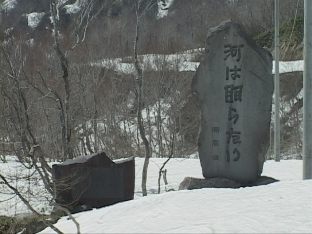 Ken Kaikoh Memorial,Ginzan-Daira,Uonuma-city,Niigata-pref,Japan.May 2004.